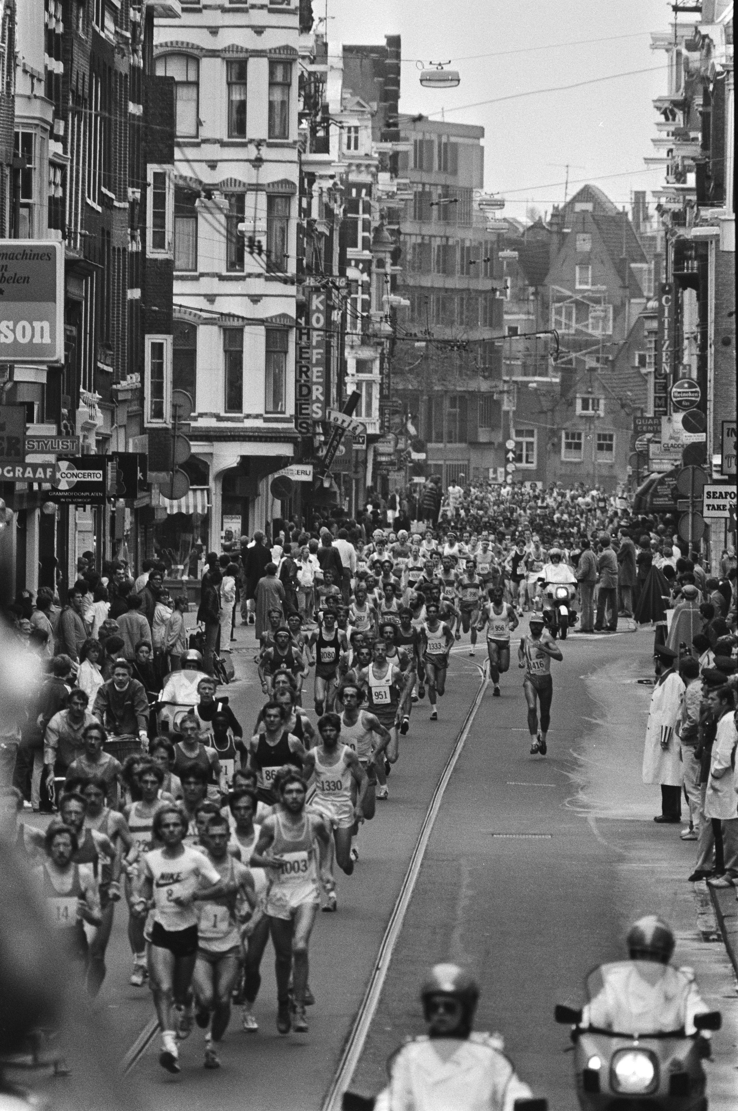 Collectie / Archief : Fotocollectie Anefo Reportage / Serie : Marathon 1983 van Amsterdam Datum : 7 mei 1983 Locatie : Amsterdam, Noord-Holland Trefwoorden : hardlopen, marathon Fotograaf : Croes, Rob C. / Anefo Auteursrechthebbende : Nationaal Archief Materiaalsoort : Negatief (zwart/wit) Nummer archiefinventaris : bekijk toegang 2.24.01.05 Bestanddeelnummer : 932-5843